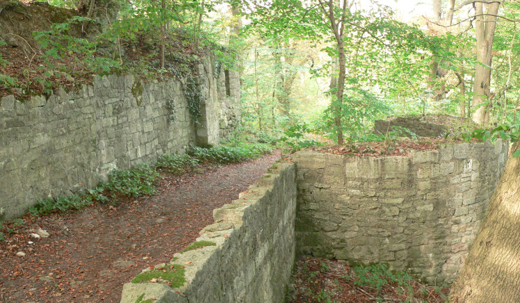 Burg Stauffenburg, Eingangsbereich mit Torzwinger